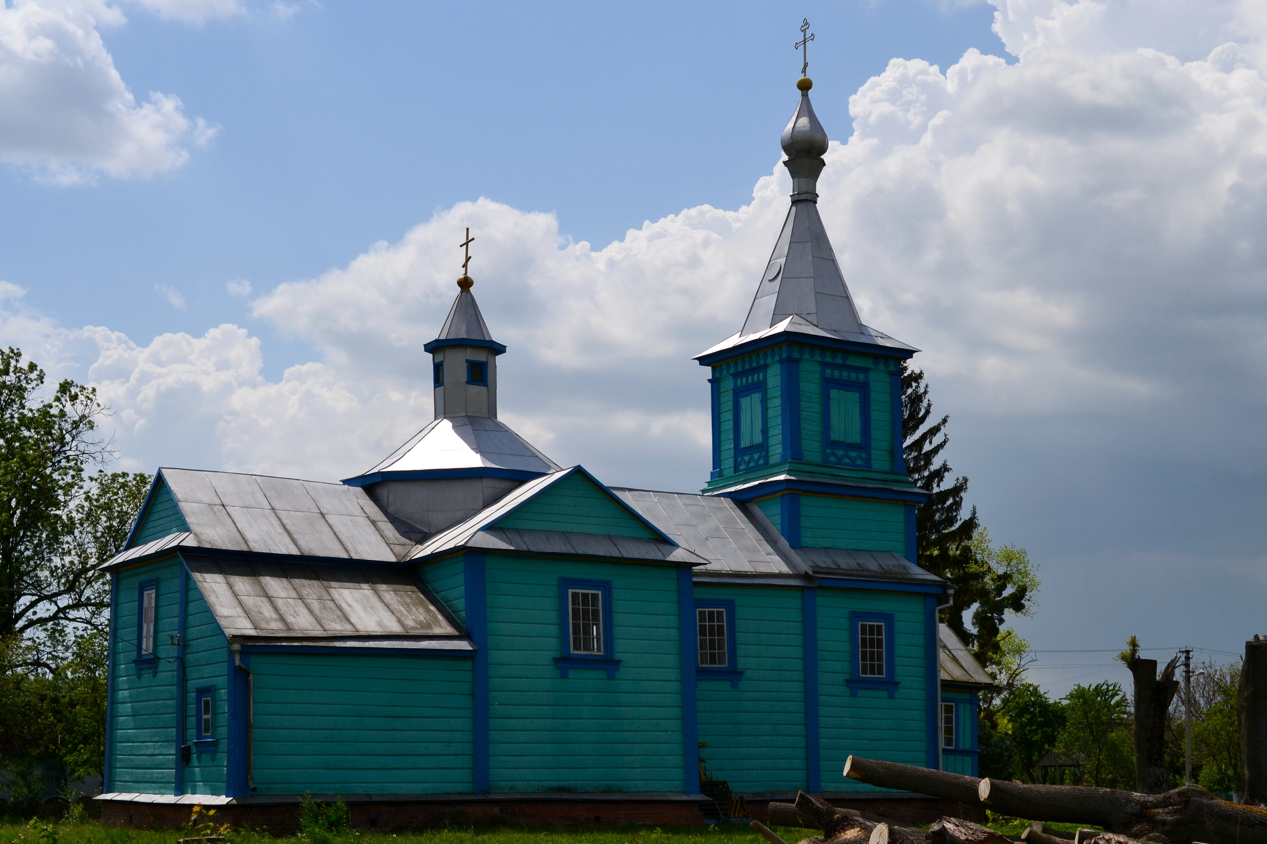 Михайлівська церква (дер.) (1772 рік) - вигляд з північного сходу - Оса (вул. Ліснича) Турійський район Волинська область Україна